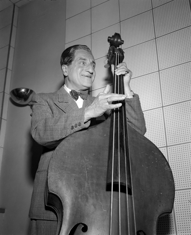 Karl Farkas mit einem Kontrabass im Studio des Senders Rot-Weiß-Rot (Wien)